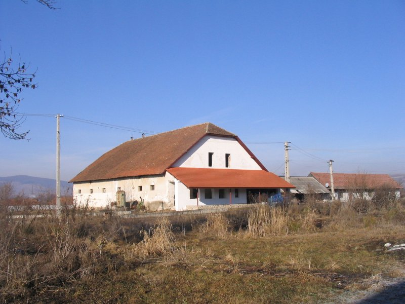 Bethlen kastély, Olasztelek, 2007